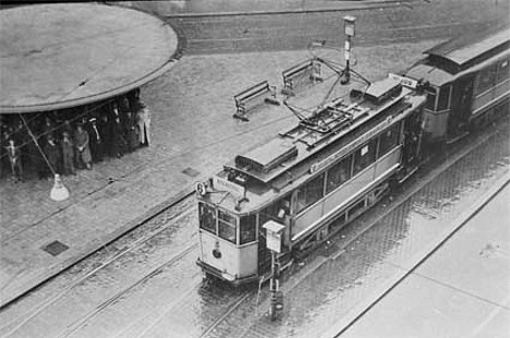 Luftskyddsövning i Stockholm 1943, man söker skydd under "Svampen" på Stureplan